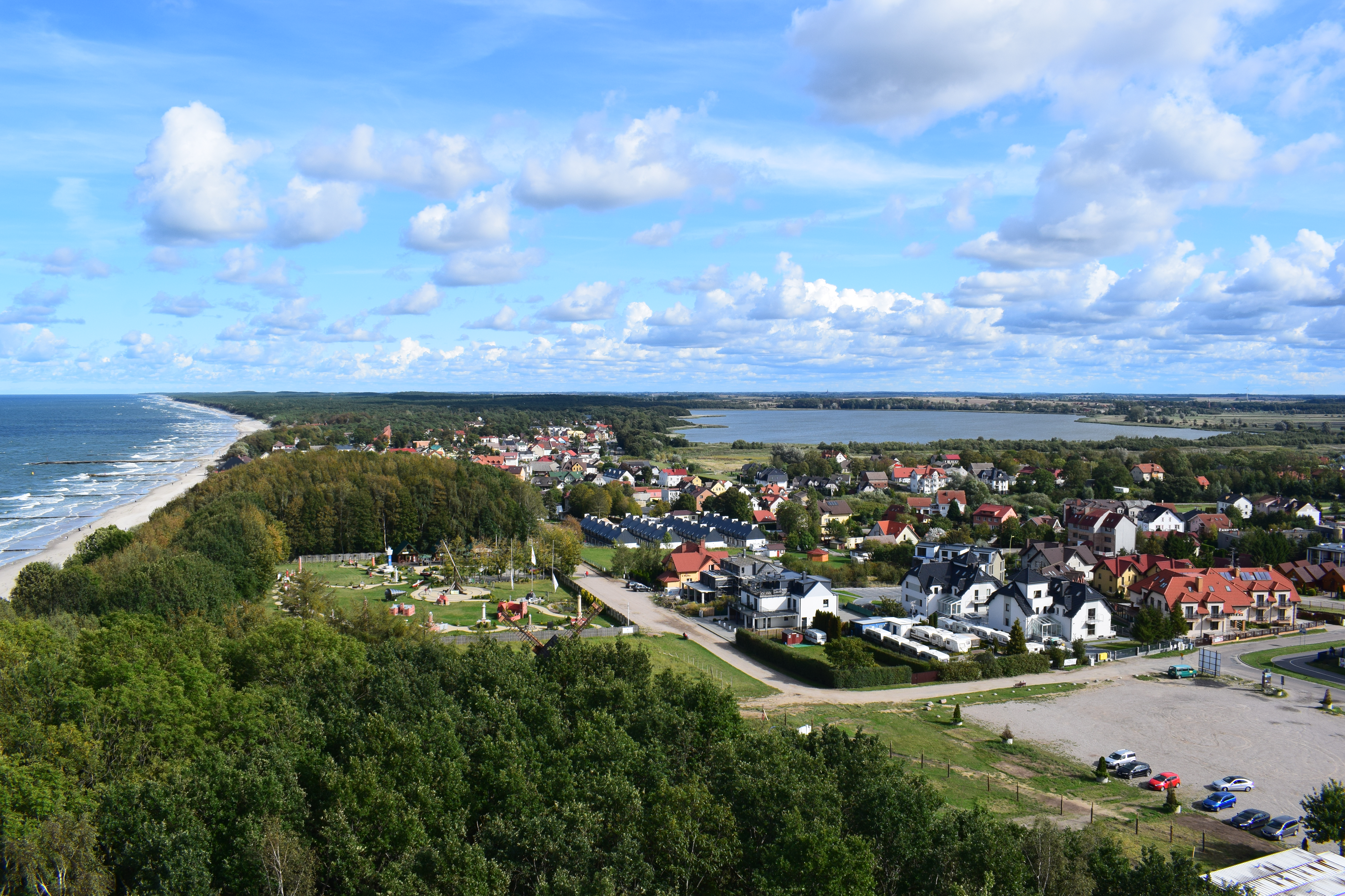 Blick vom Leuchtturm auf Niechorze zwischen der Ostsee links und dem See Liwia Łuża rechts.